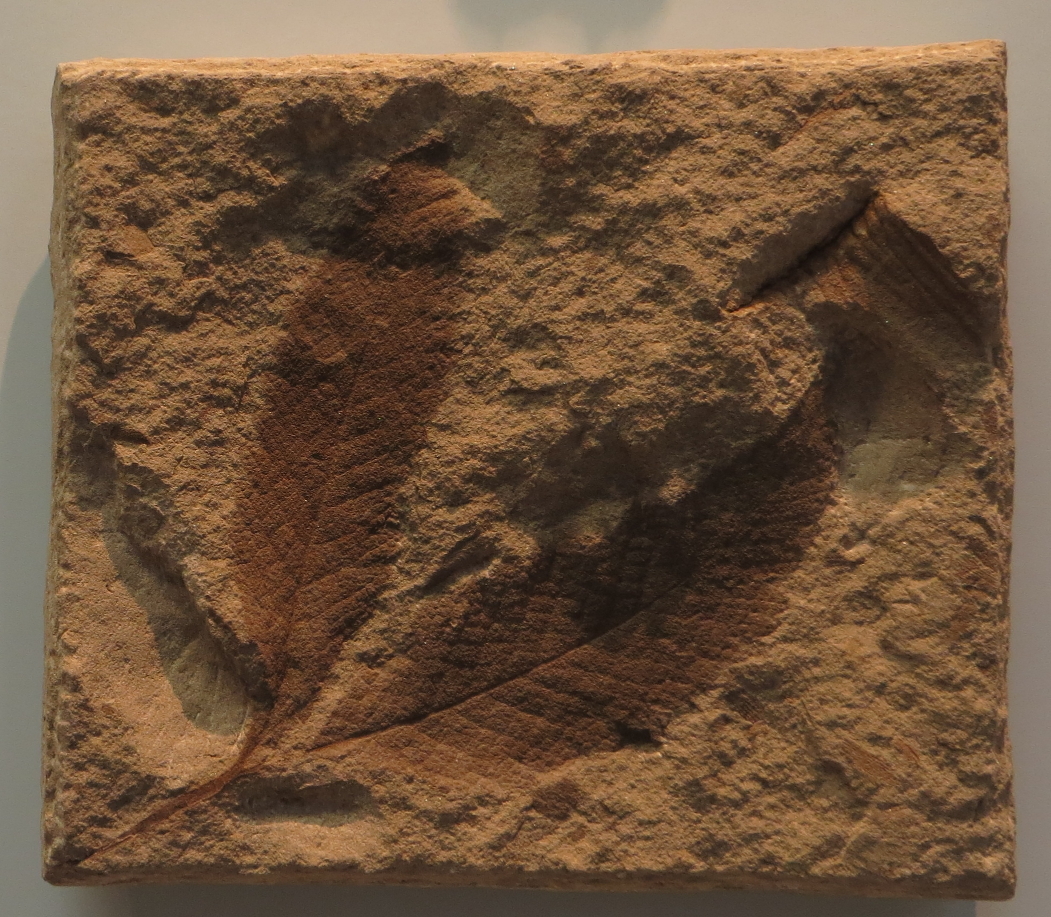 Fossil of plant- Took the picture at Museum am Löwentor, Stuttgart